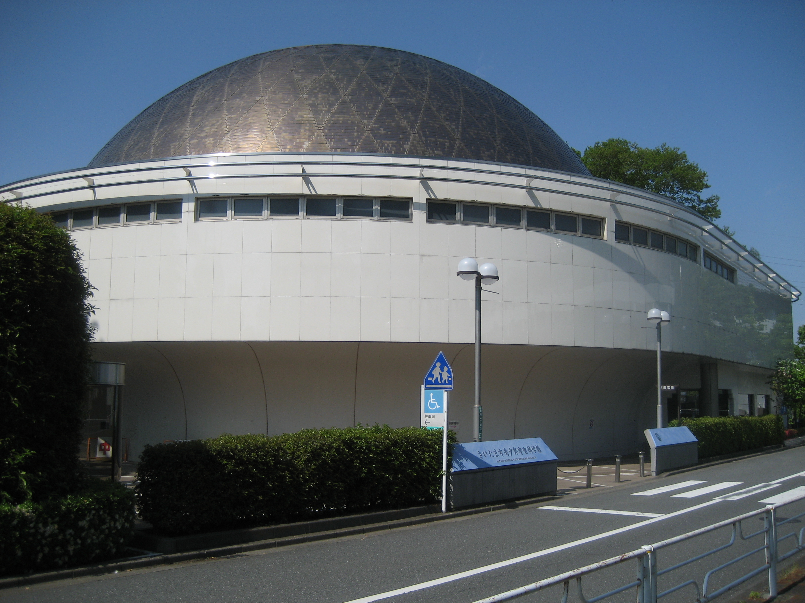 さいたま市青少年宇宙科学館（正面付近を撮影）